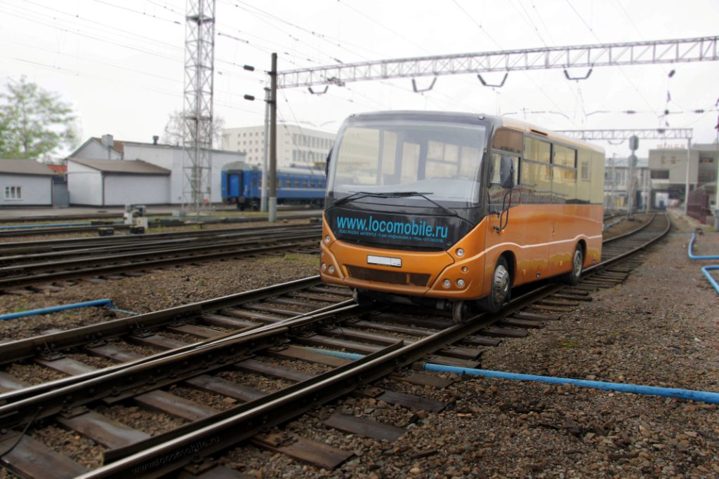 Автобус для перевозки пассажиров по дорогам общего пользования (асфальту, грунтовым дорогам). С помощью комбинированного железнодорожного хода автобус фиксируется на рельсах железных дорог.